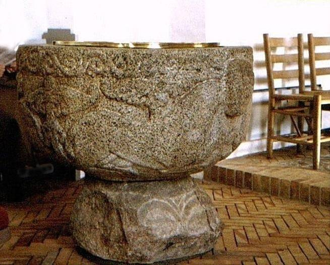 Balle Kirke, Døbefont